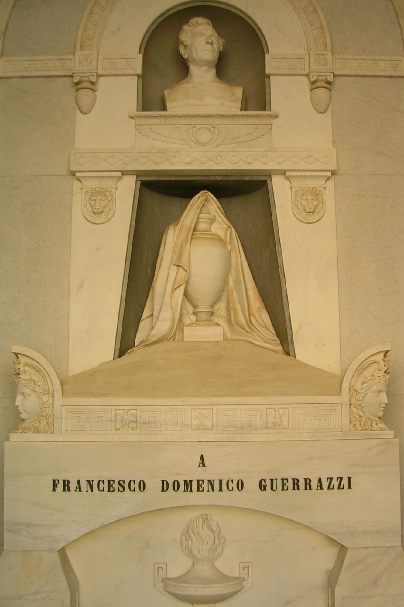 Livorno: il Monumento funebre a Francesco Domenico Guerrazzi sul colle di Montenero.